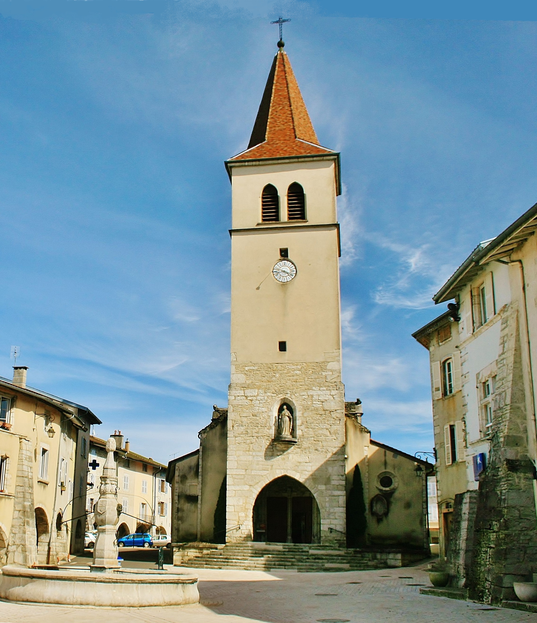 Notre-Dame de la Petite montagne. Eglise d'Arinthod.